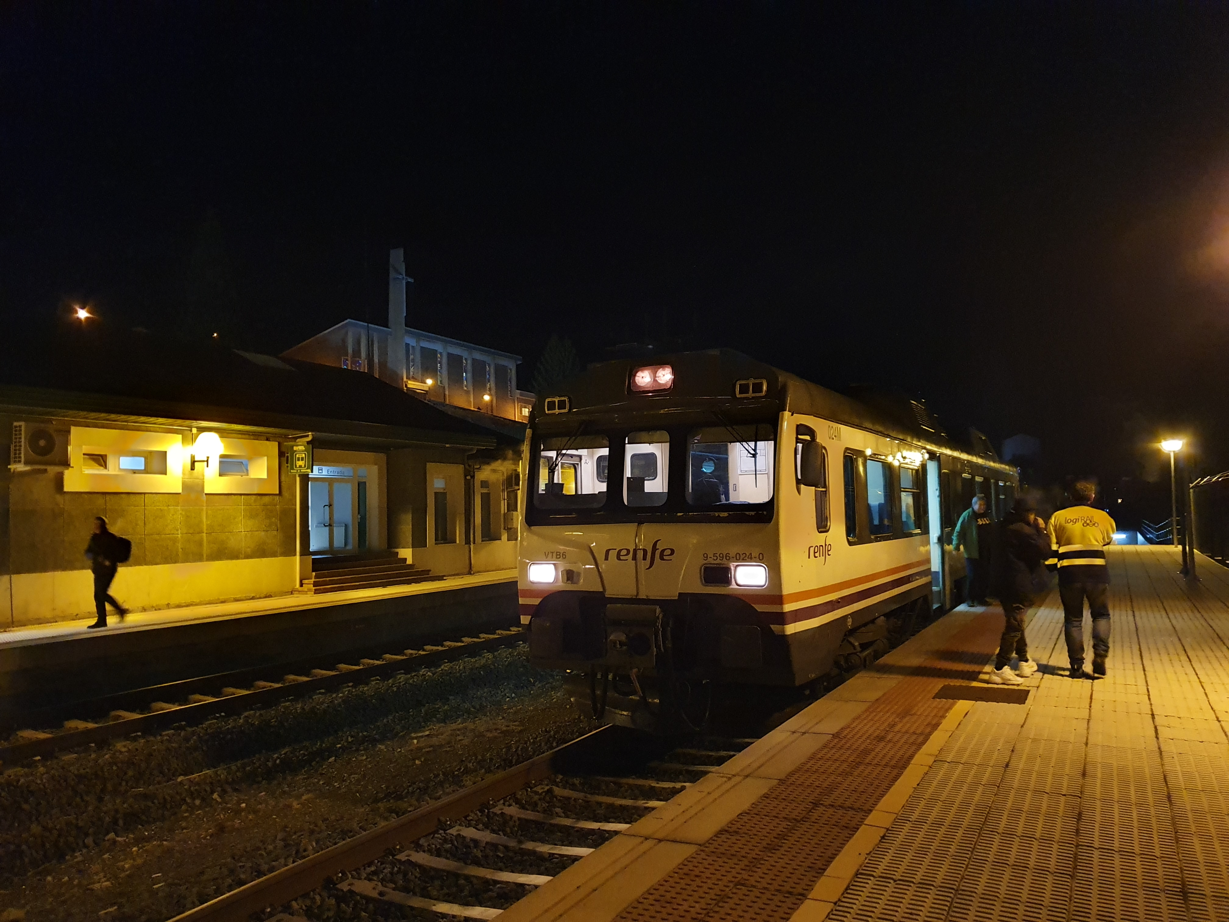 Sabiñánigo